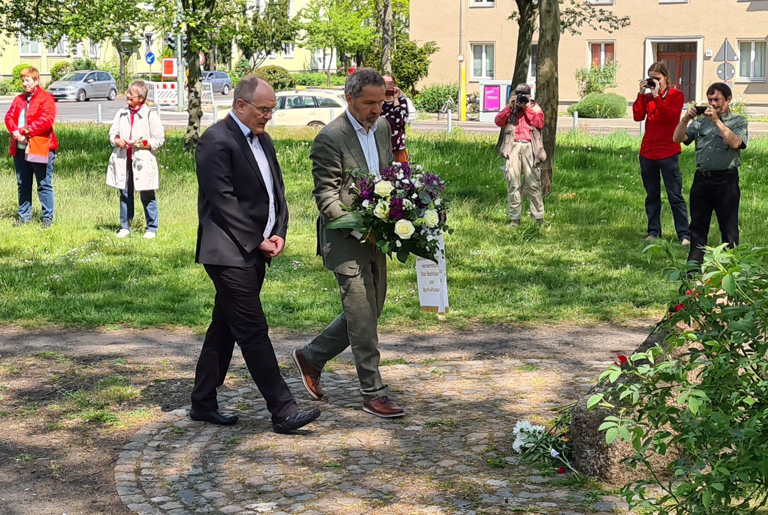 Kranzniederlegung zum 75. Jahrestag der Befreiung am 8. Mai 2020, Mahnmal am Berliner Ostseeplatz - Bezirksbürgermeister von Berlin-Pankow Sören Benn (mit Kranz) und Bezirksverordnetenvorsteher Michael van der Meer